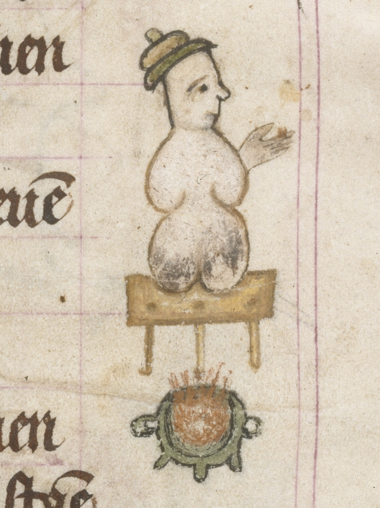 Vroegste afbeelding van een sneeuwpop Uit: Getijden-en gebedenboek; Brussel, ca. 1390. Signatuur: KB Den Haag, KW KA 36, fol. 78v.